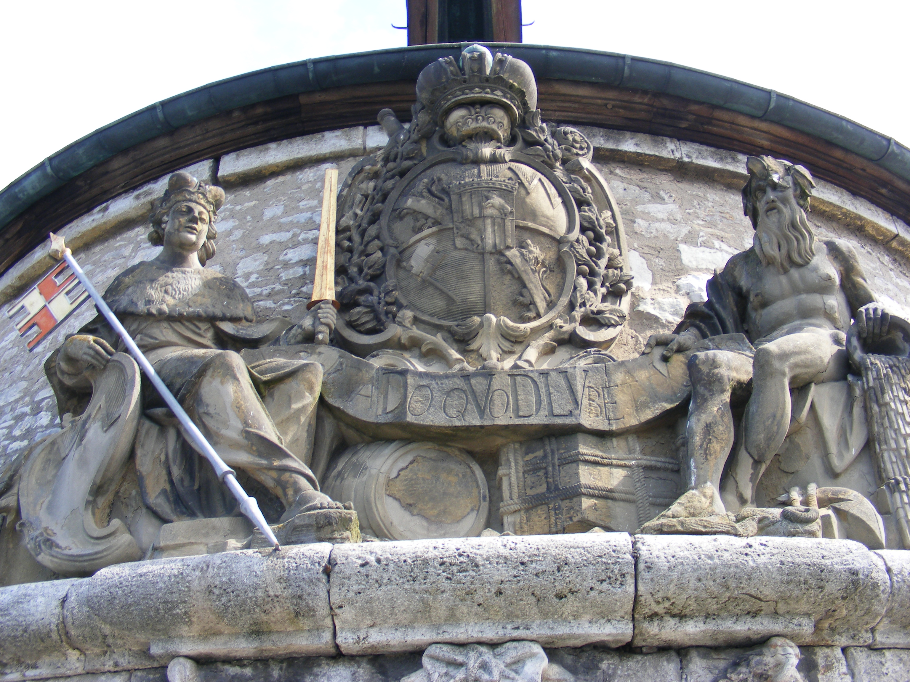 Würzburg - Alter Kranen (Kranenkai, mainseitig): Dreidimensionales Wappen des Fürstbischofs Adam Friedrich von Seinsheim mit Götterpaar ([1]).